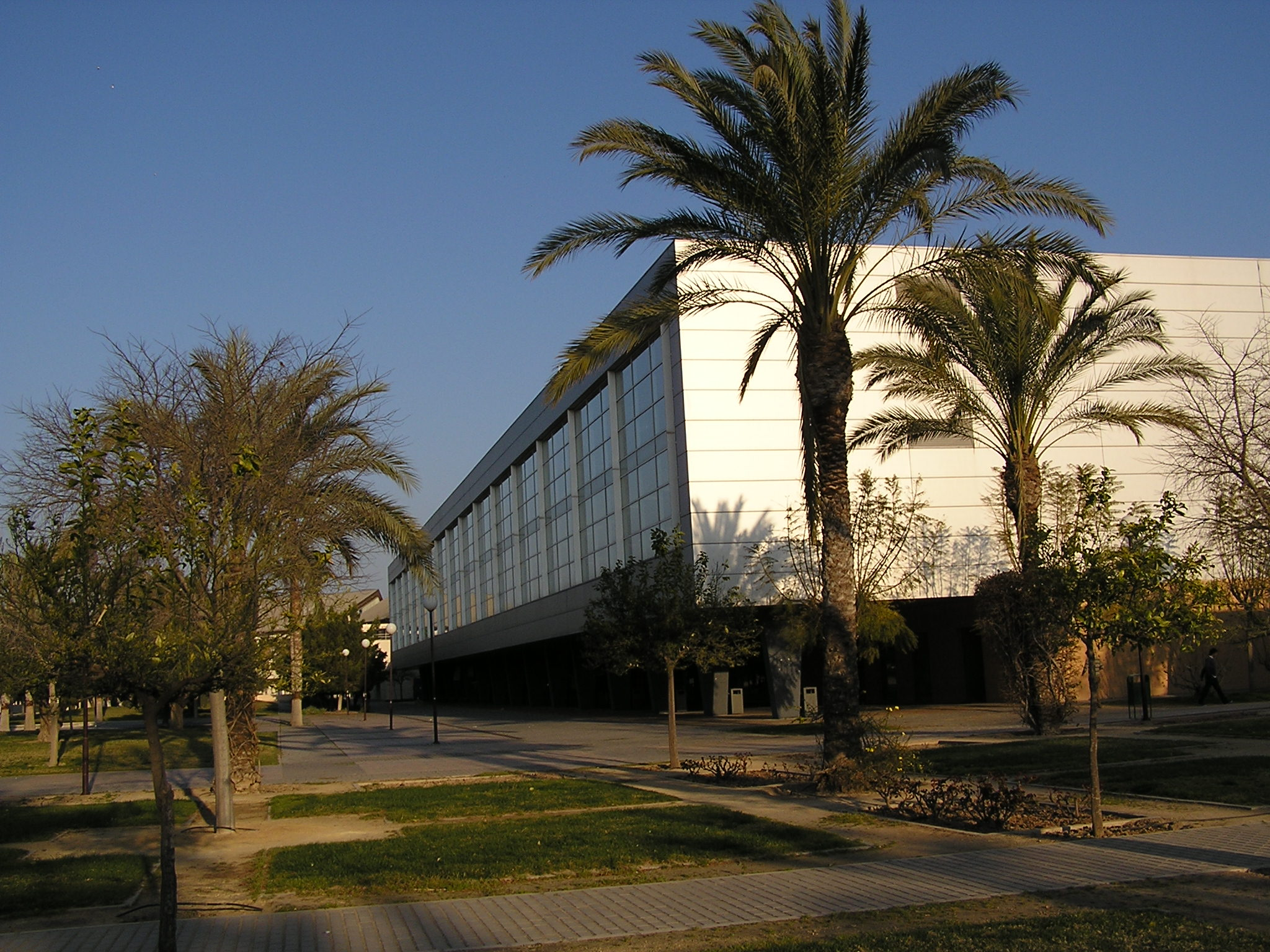 Biblioteca General. Campus Universitat d'Alacant - Universitätscampus Universität Alicante - Campus University of Alicante - Campus Universidad de Alicante - Campus Université d'Alicante - Campus Università di Alicante